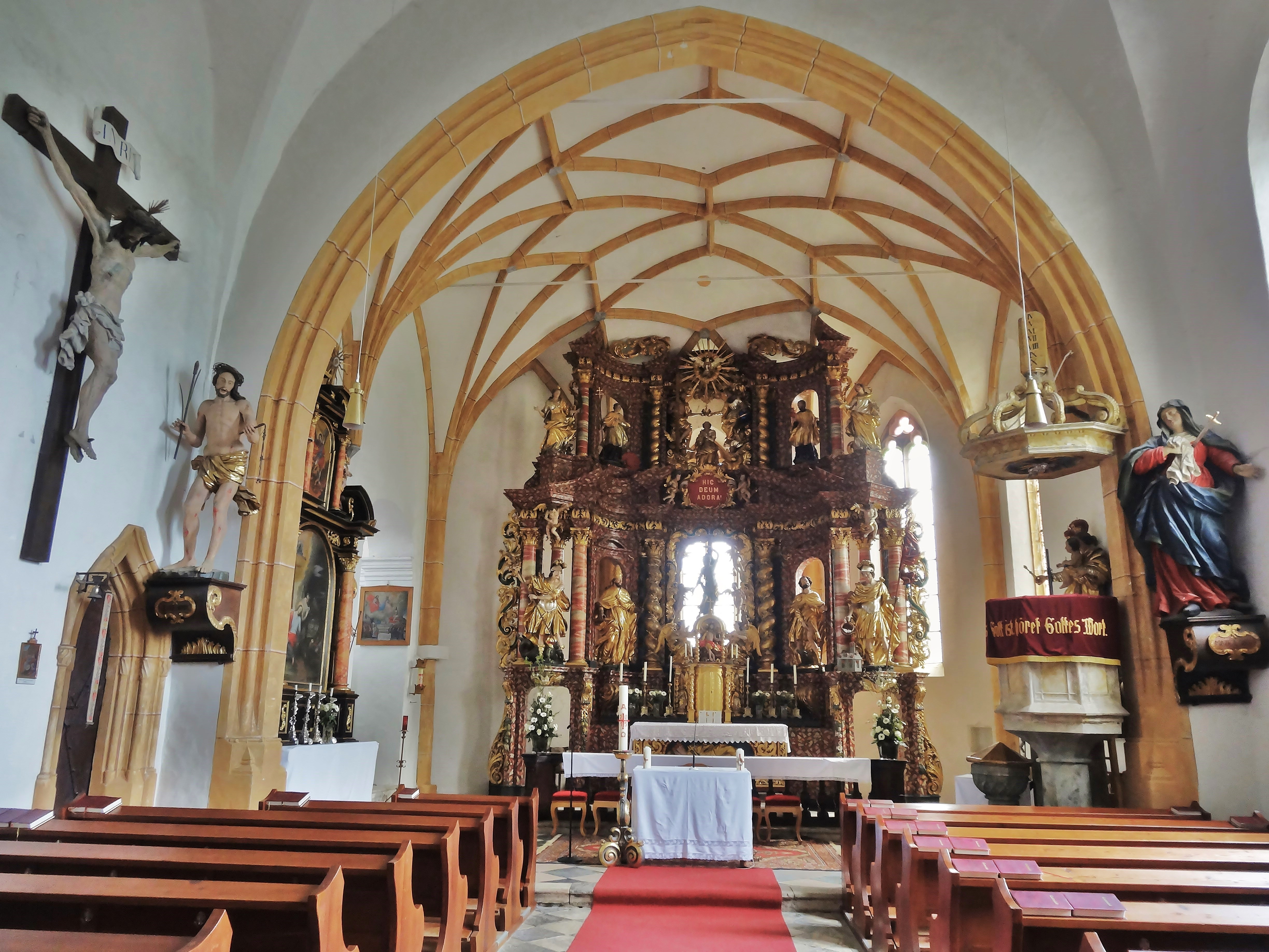 Kath. Pfarrkirche St. Sebastian (Launsdorf), Innenansicht